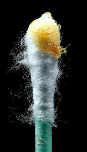 Ouereschmalz